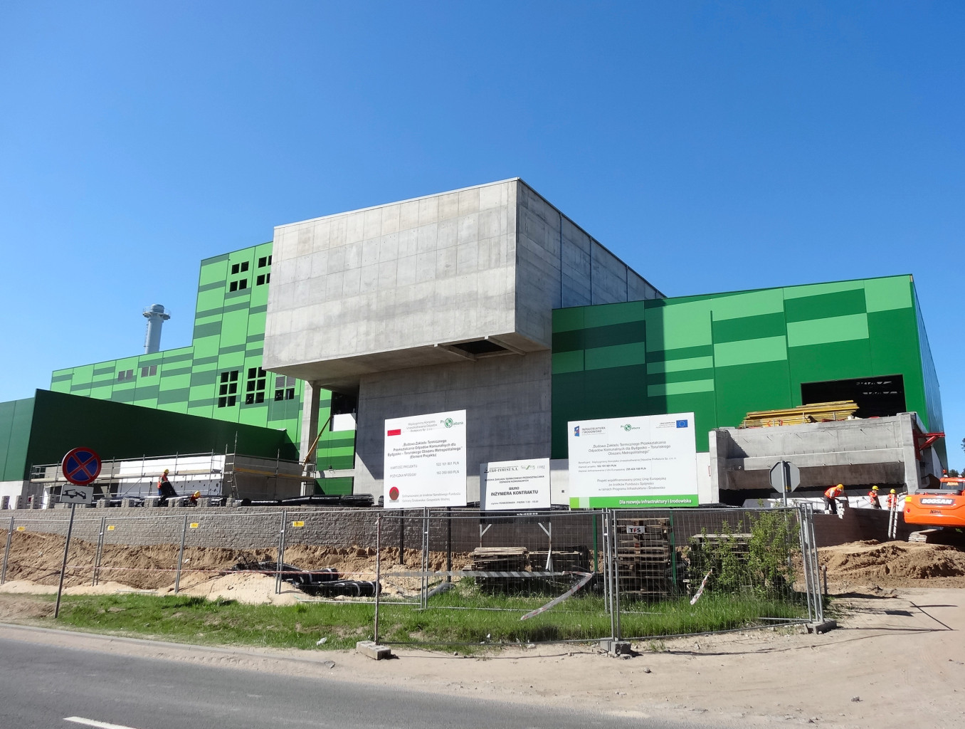 Spalarnia odpadów komunalnych (w budowie) dla Bydgosko-Toruńskiego Obszaru Funkcjonalnego na terenie Bydgoskiego Parku Przemysłowo-Technologicznego